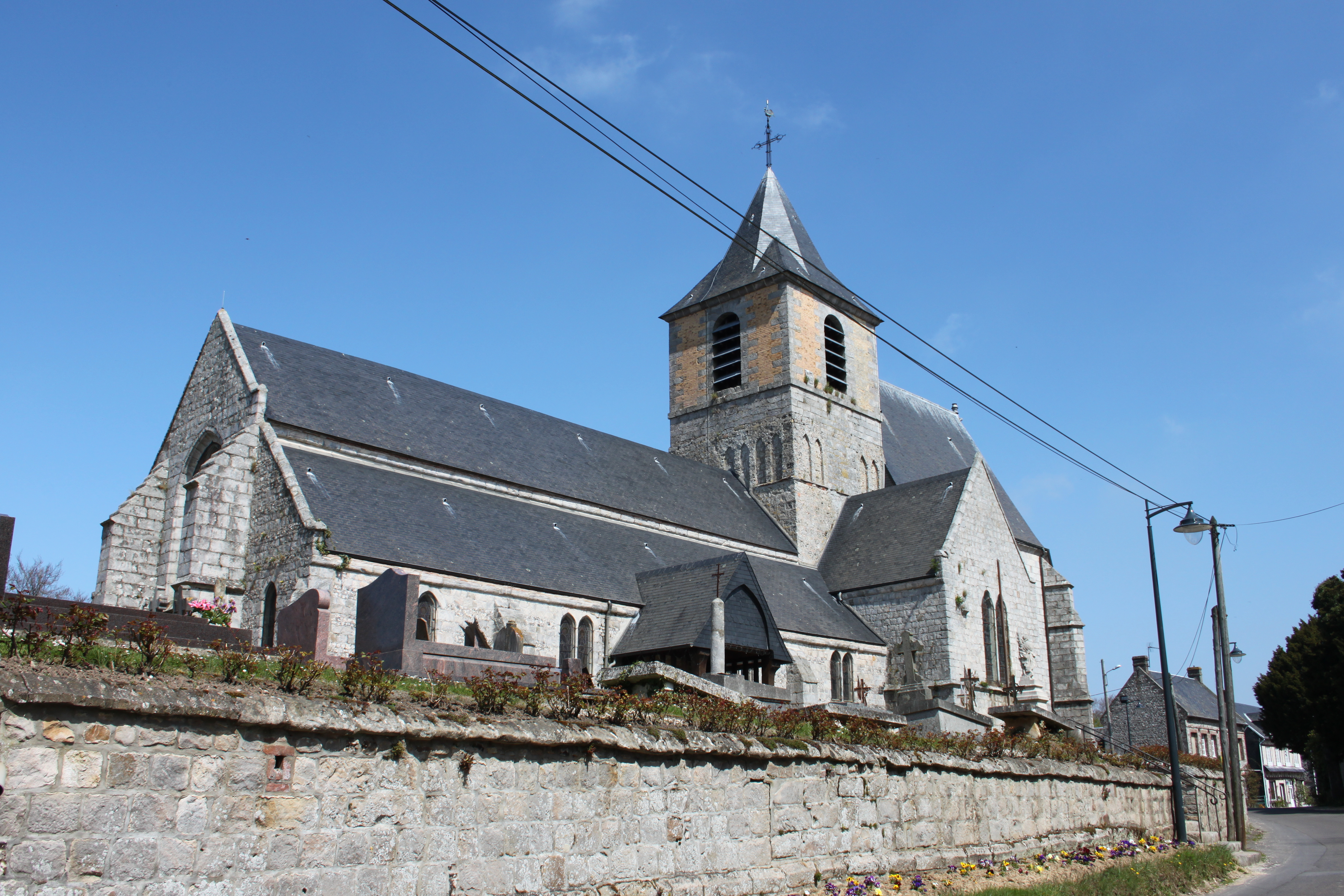 église de blosseville-sur-mer